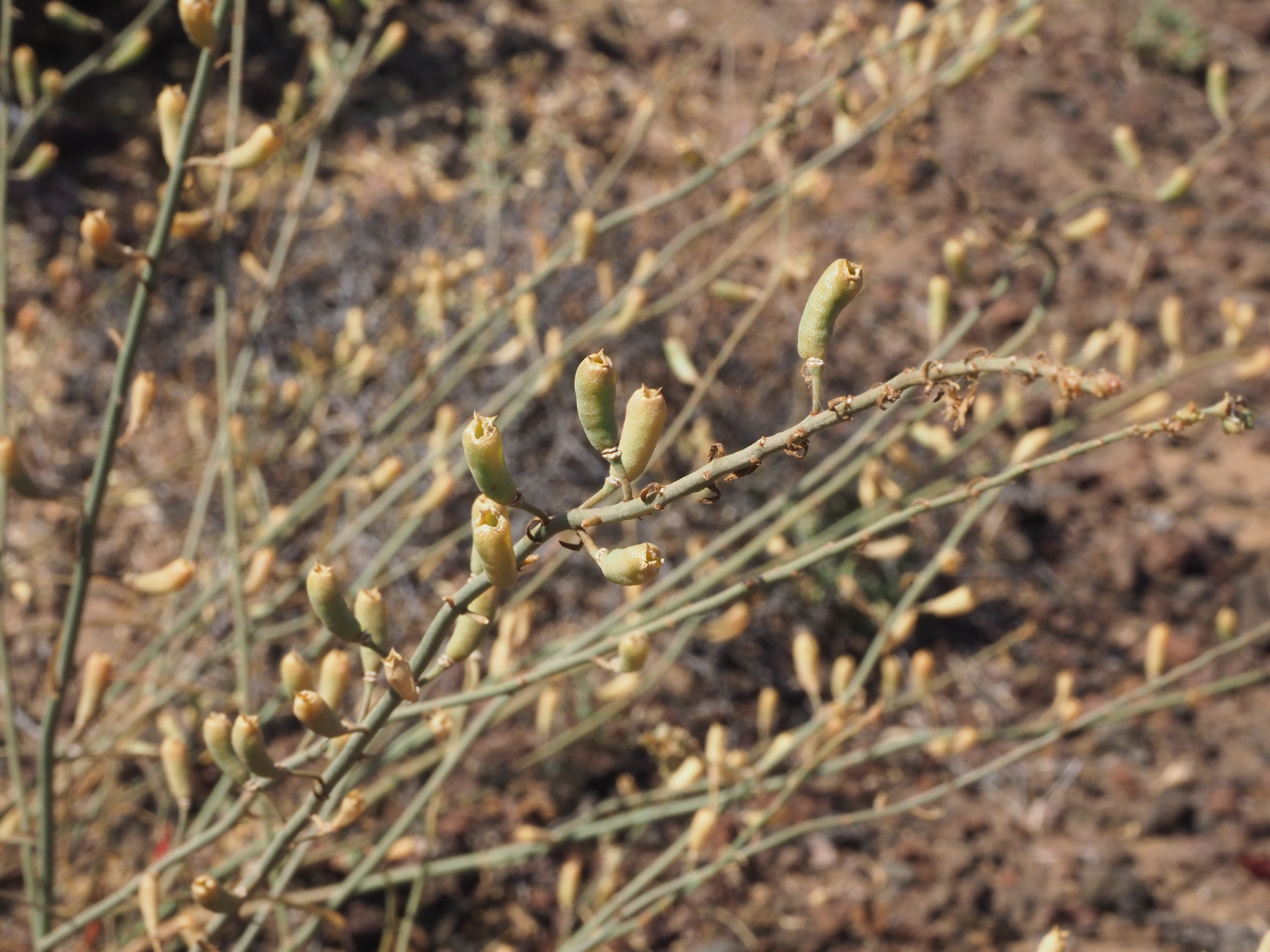 Reseda scoparia (Gualdón), frutos. Malpaís de Rasca, Tenerife.